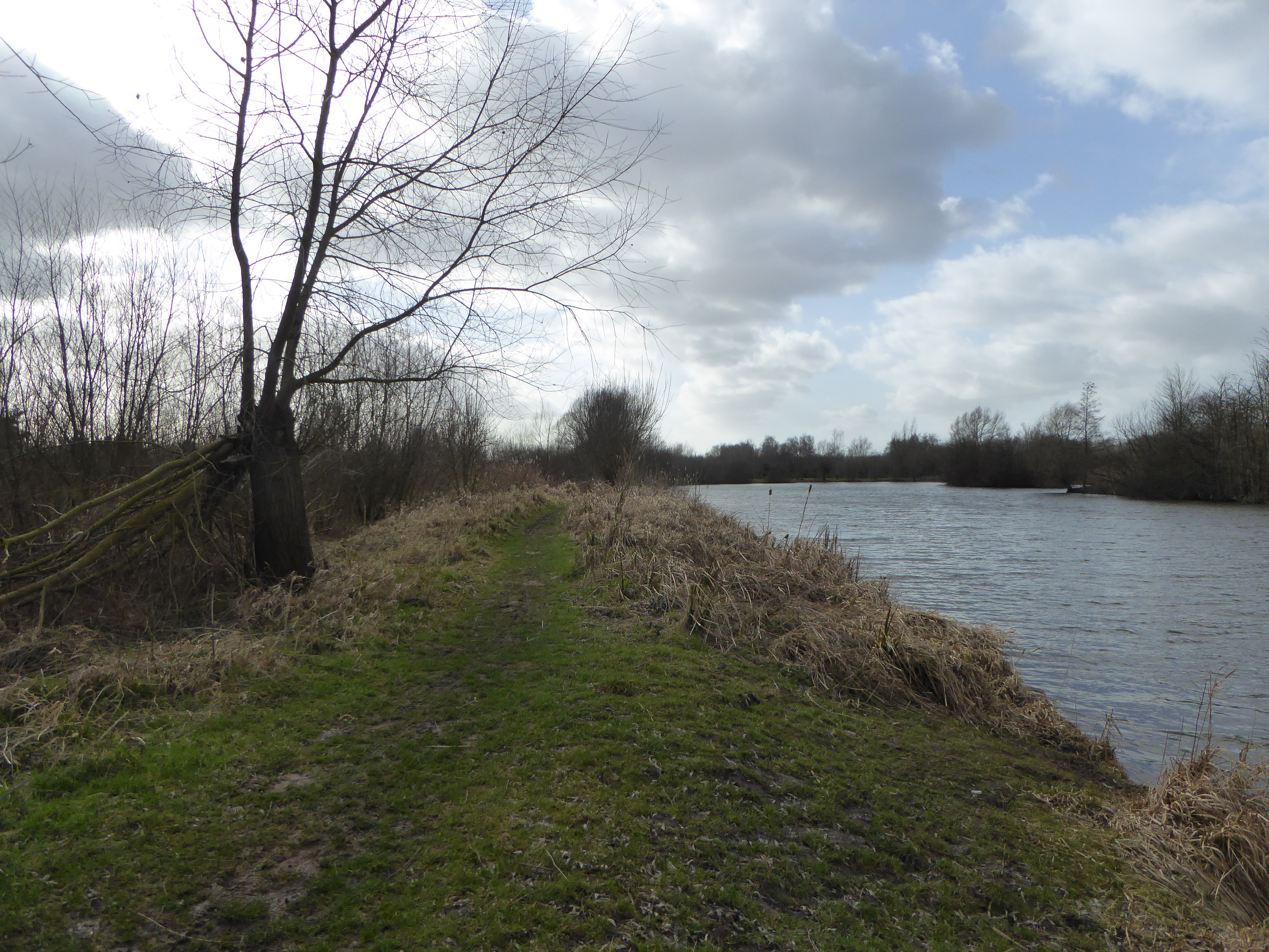 l'Escaut à Hergnies à Nord, Nord-Pas-de-Calais.- France.